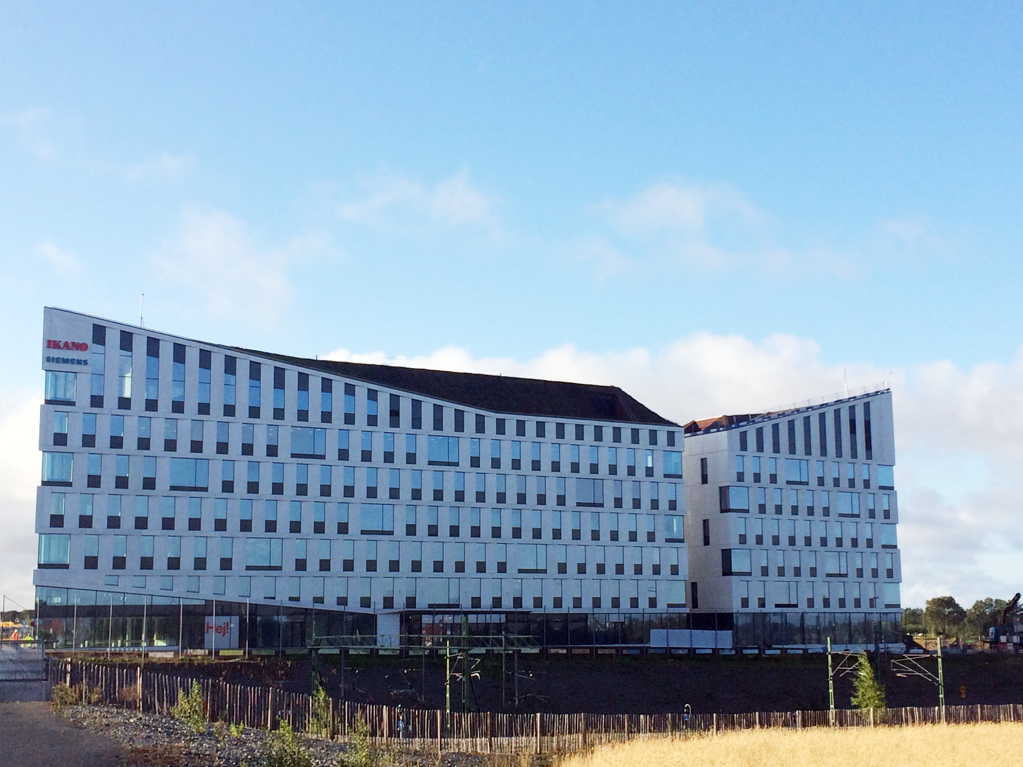 Ikano Banks huvudkontor i Malmö